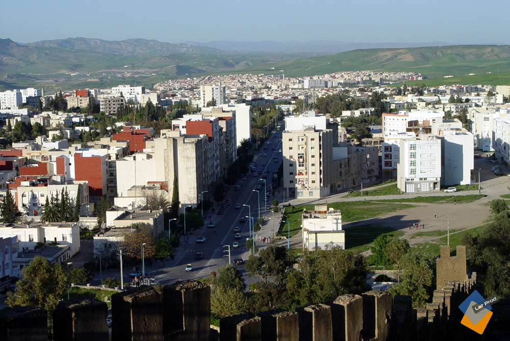 Taza, Ville Nouvelle